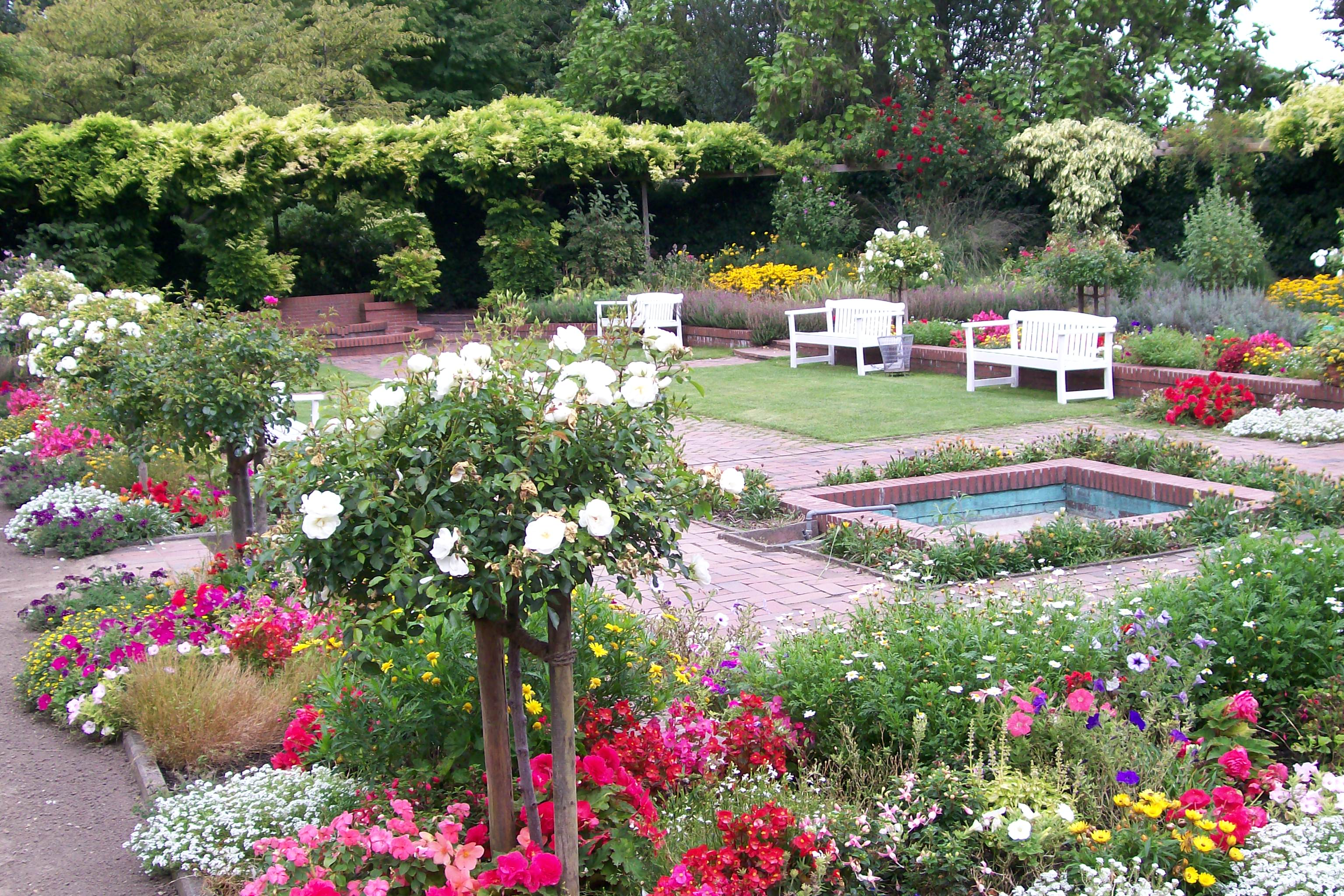 Schulgarten Lübeck in Lübeck, Germany, Einjahresblumen